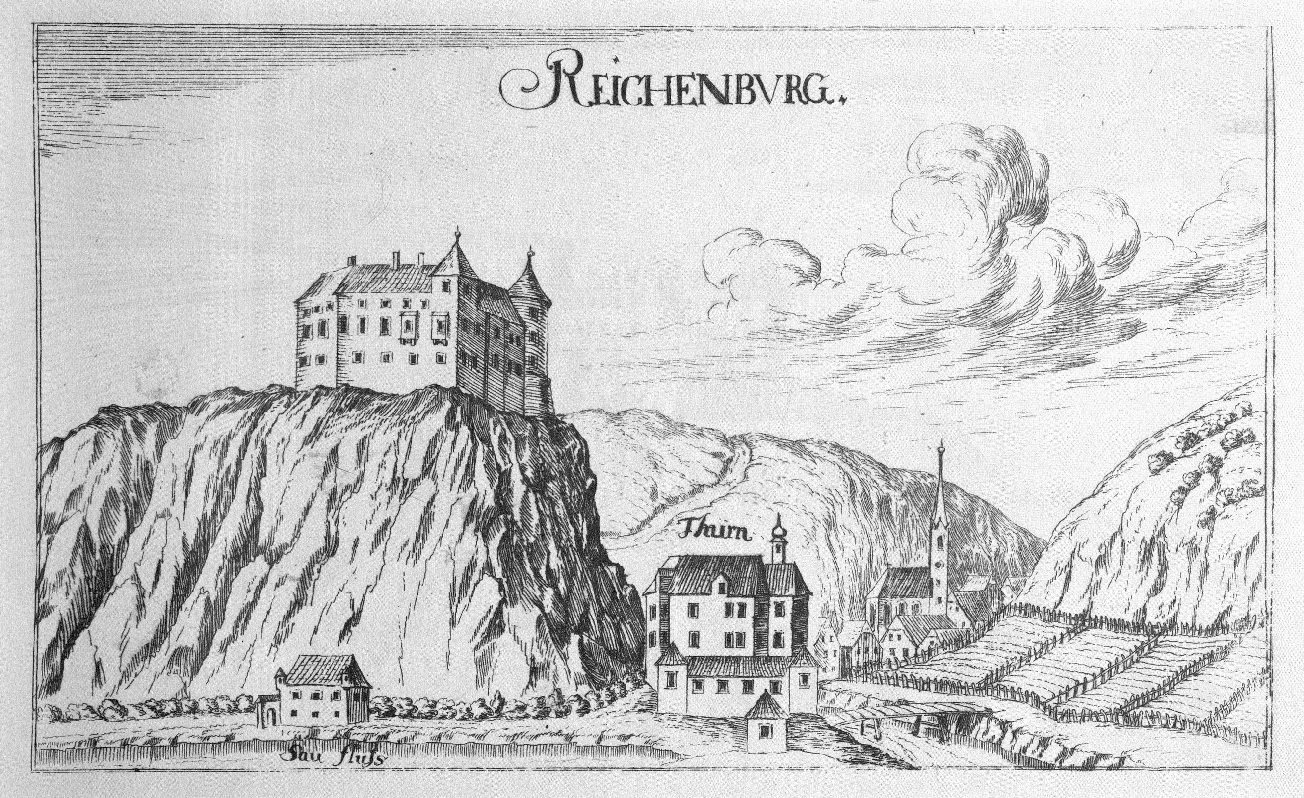 G. M. Vischers Käyserlichen Geographi, Topographia Ducatus Stiriae, Das ist: Eigentliche Delineation / und Abbildung aller Städte / Schlösser / Marcktfleck / Lustgärten / Probsteyen / Stiffter / Clöster und Kirchen / so es sich im Herzogthumb Steyrmarck befinden; Und anjetzo Umb einen billichen Preyß zu finden seynd Bey Johann Bitsch Universitäts Buchhandlern / Auff dem Juden=Platz bey der guldenen Saulen. Graz 1681 Die Nummerierung der Dateien folgt der alphabetischen Reihung der Ortsnamen und entspricht nicht dem Vischer-Register